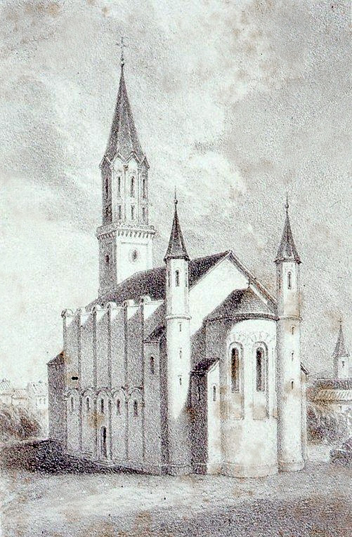 Eglise d'Herbitzen. Bibliothèque nationale et universitaire de Strasbourg